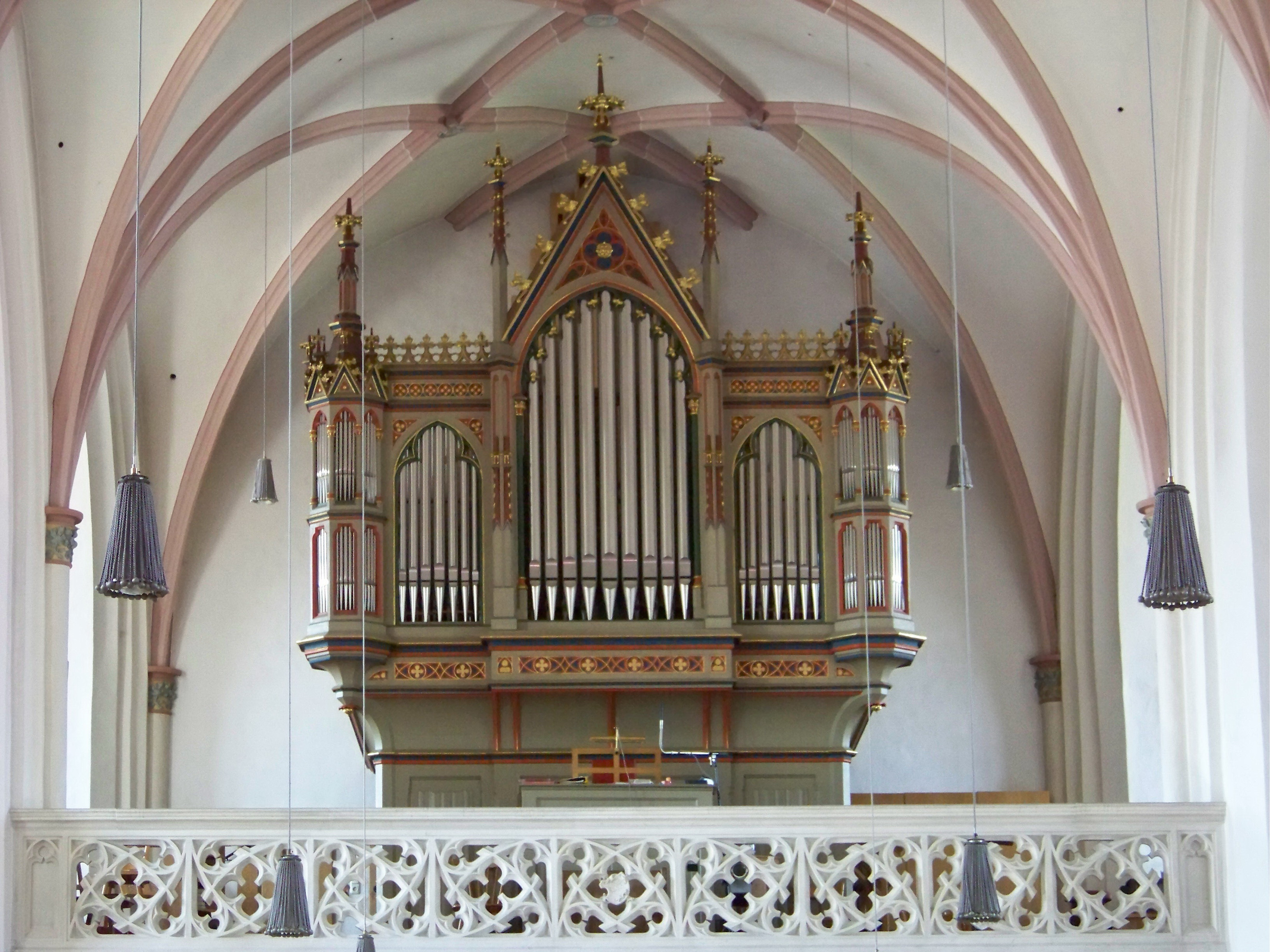 Geisenhausen, Martin-Zeiler-Straße 2. Katholische Pfarrkirche St. Martin. Hallenkirche, spätgotischer Backsteinbau der Landshuter Bauhütte. Westempore mit Orgel.